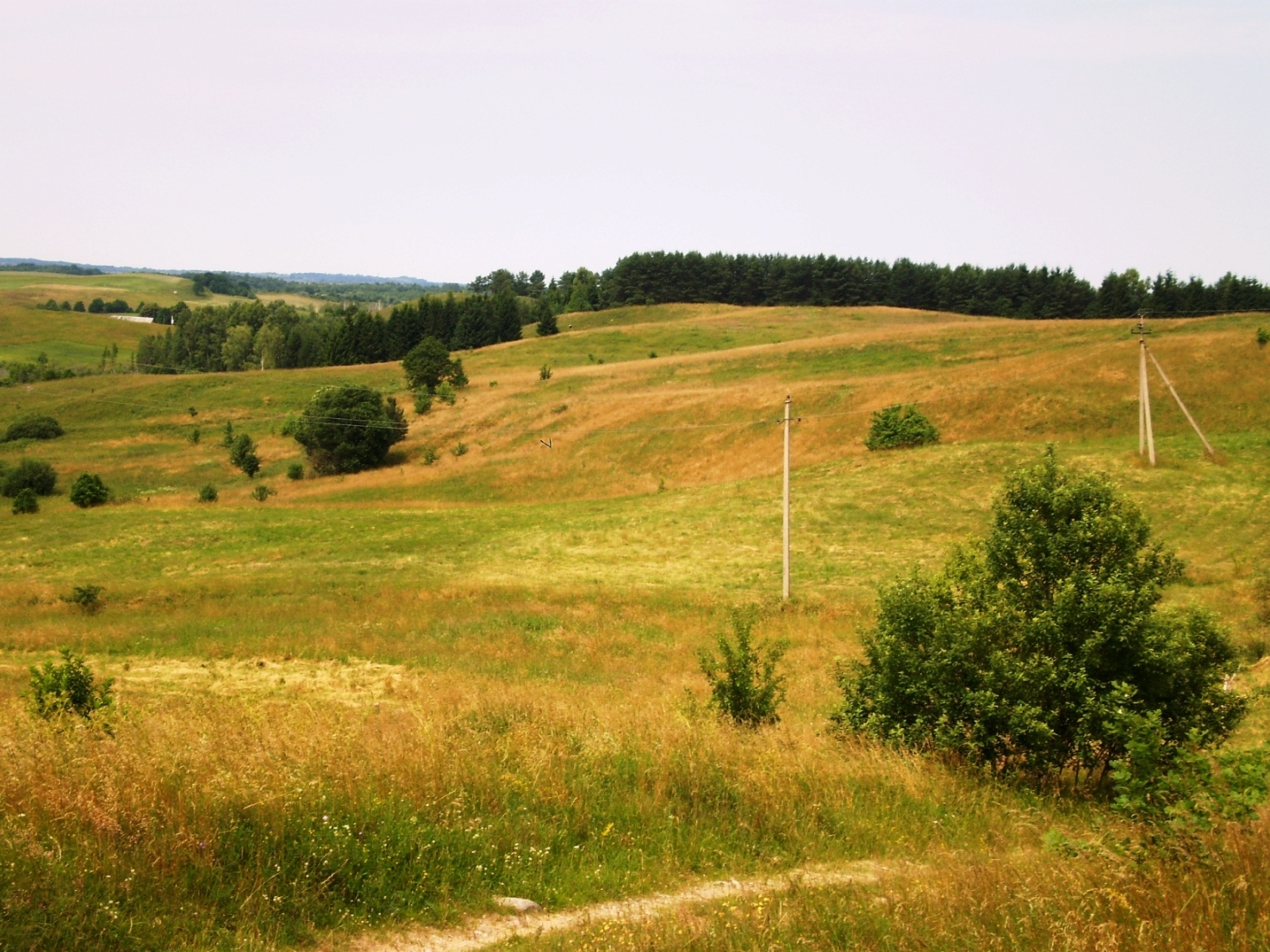 Pavištyčio I piliakalnis, Vištyčio RP, Vilkaviškio raj.